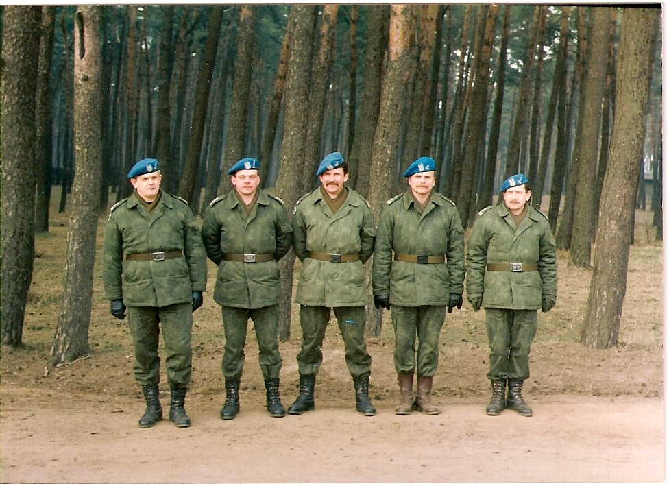 Dowództwo 3 Brygady Pancernej z Trzebiatowa na poligonie w Drawsku własność zdjecia P.L Autor scan Kerim44